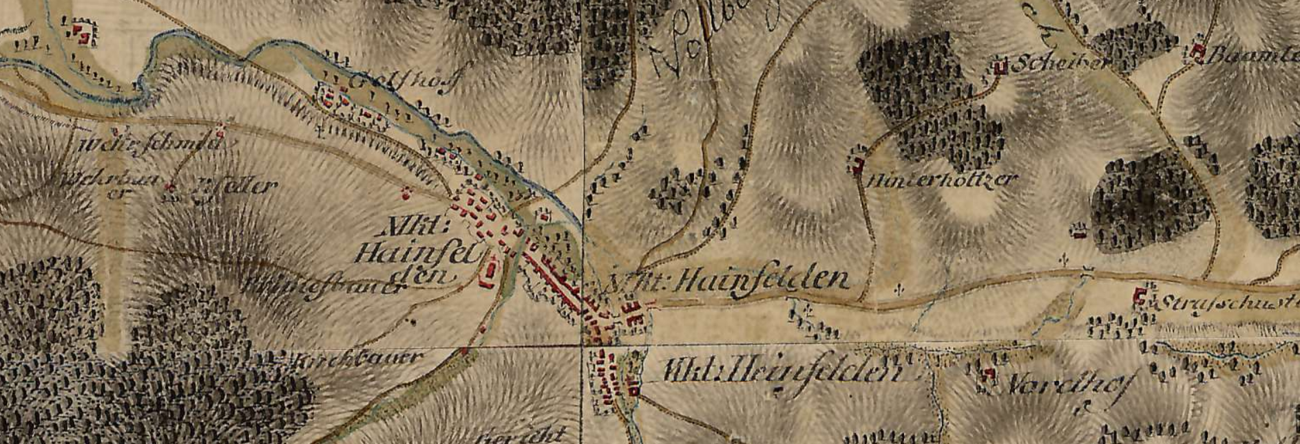 Hainfeld auf einer Karte der Josephinischen Landaufnahme